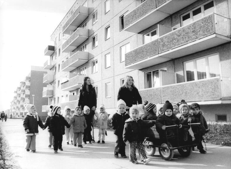 Neubrandenburg, Neubrandenburg-Ost, Humboldt-Straße ADN-ZB Bartocha 19.3.1974 Bez. Neubrandenburg. Kinderkrippe beim Spaziergang, durch die Humboldt-Straße, im neuen Wohngebiet, in Neubrandenburg-Ost.